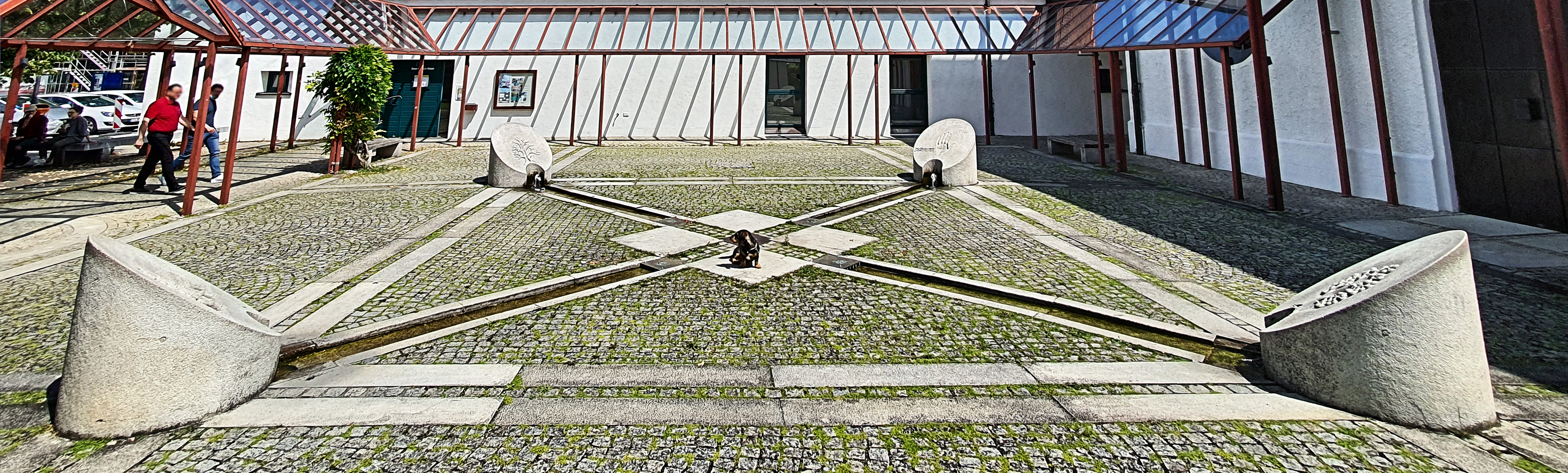 Vier Jahrezeitenbrunnen in Gröbenzell von Hubert Elsässer auf dem Kirchhof